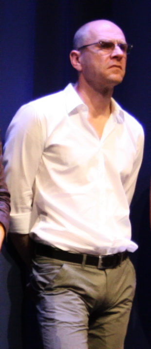 Götz Schubert auf dem Münchner Filmfest 2010. Bei der Premiere des Films Kongo.